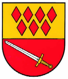 Wappen von Lirstal